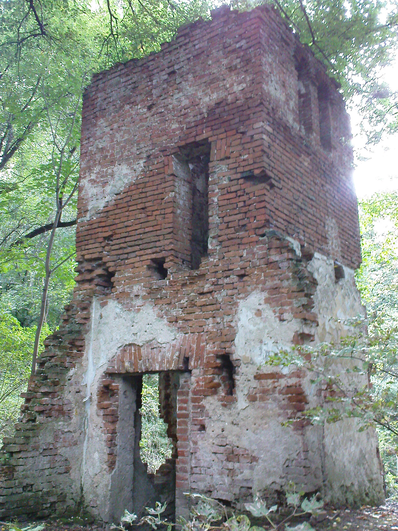 Morysin - zespół pałacowo-parkowy - domek stróża - ruiny widziane od północnego-zachodu